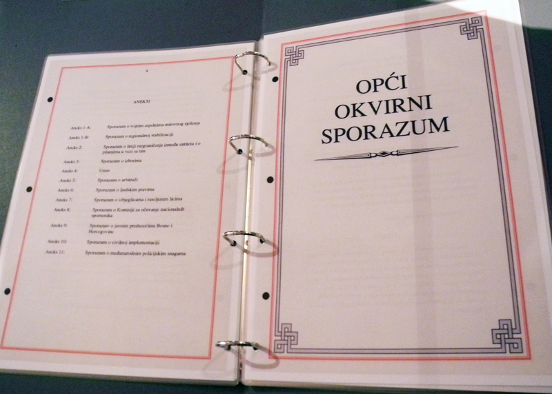 Izložba Domovinski rat u Hrvatskom povijesnom muzeju tijekom Noći muzeja.